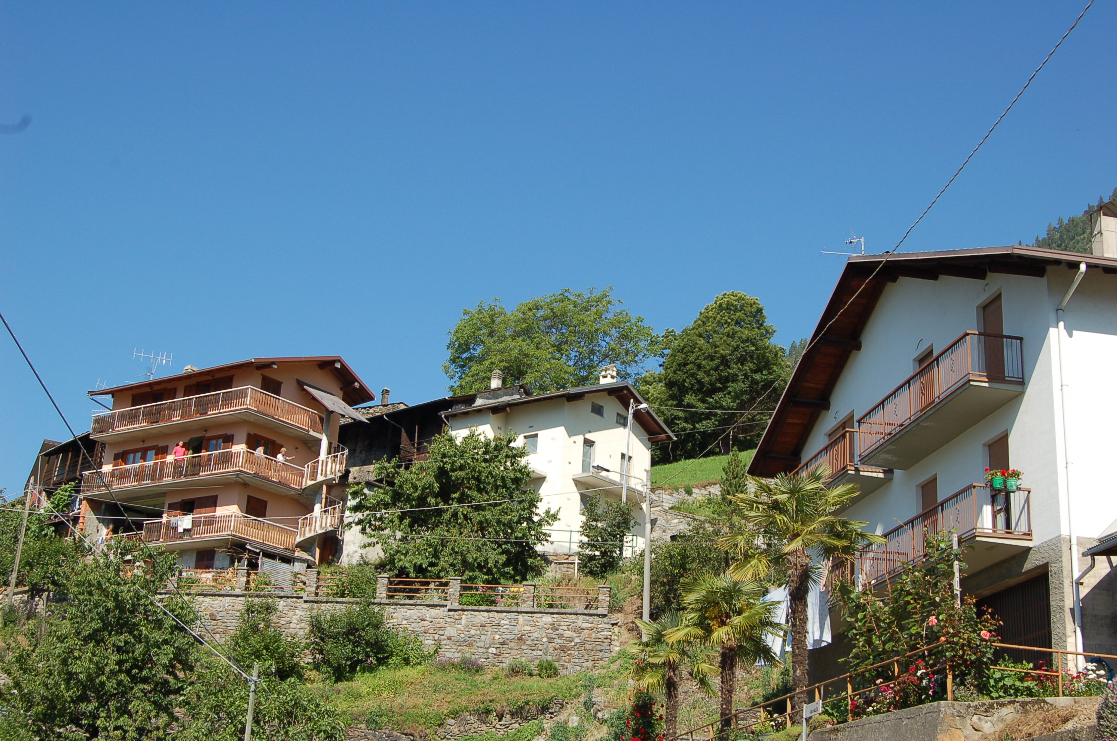 Scorcio della contrada Bottigiolo in Baruffini Frazione di Tirano Provincia di Sondrio